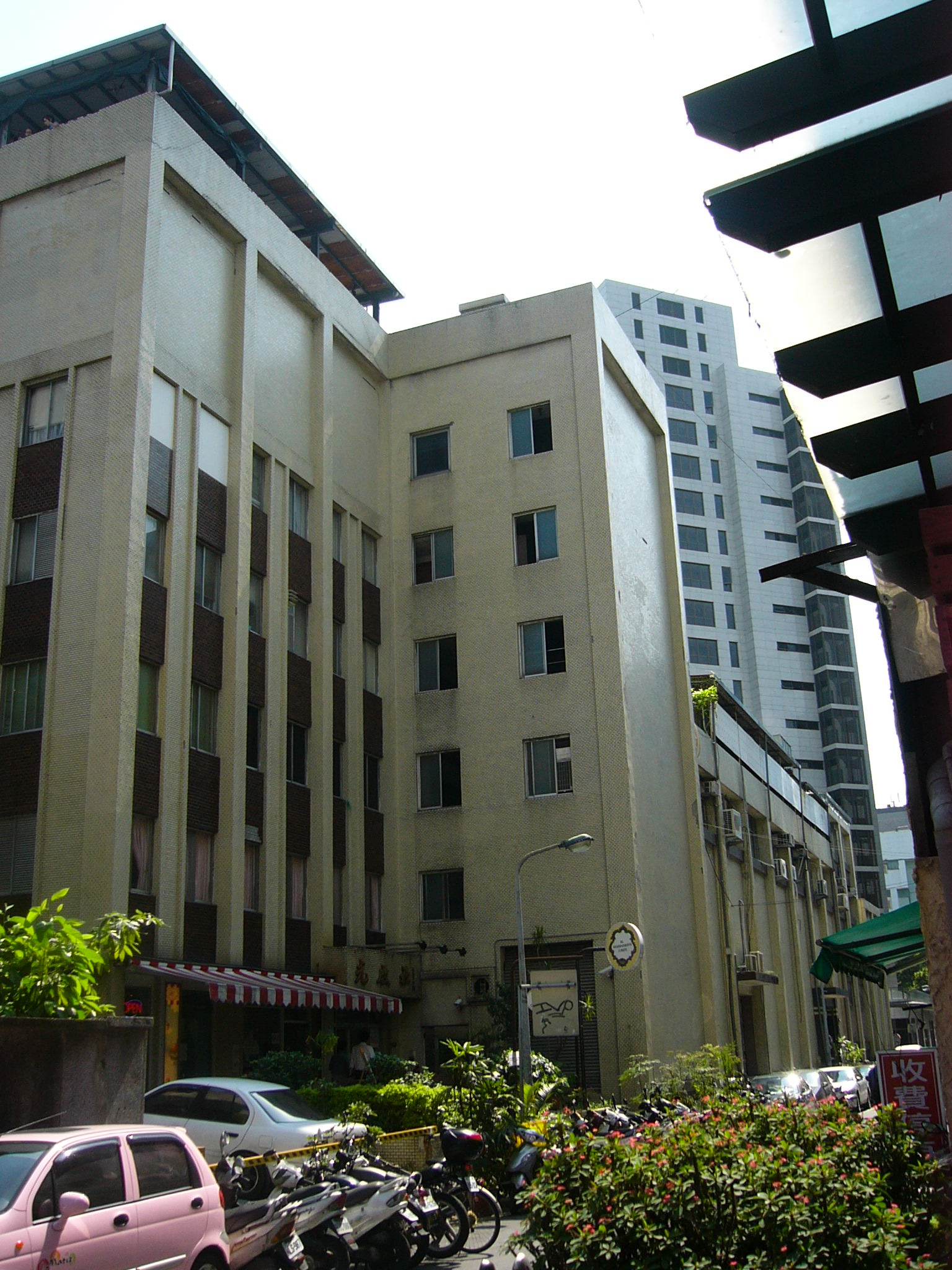 光啟社大樓左側外觀